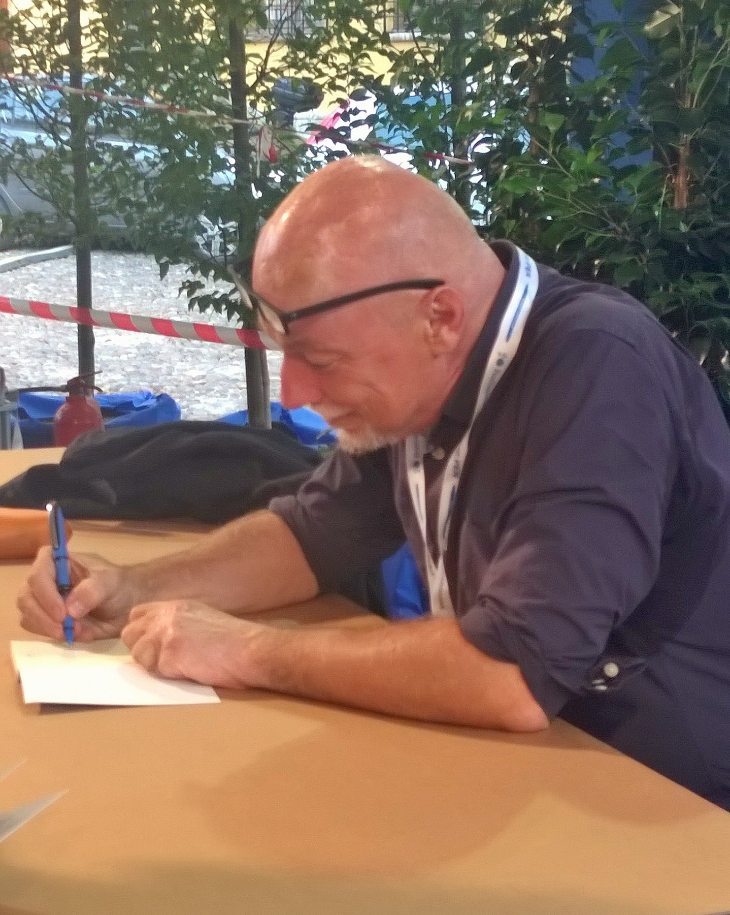 Paolo Nori al Festivaletteratura 2016, a Mantova in piazza Sordello.